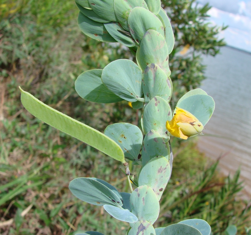 Chamaecrista desvauxii var. latistipula - FABACEAE Parque Vivencial II Lago Norte - Brasília - Distrito Federal - Brasil.